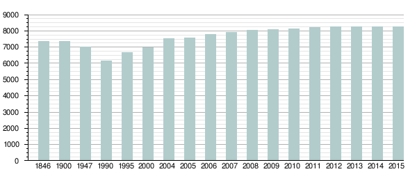 Коммунаның халқы XIX—XXI ғасырда